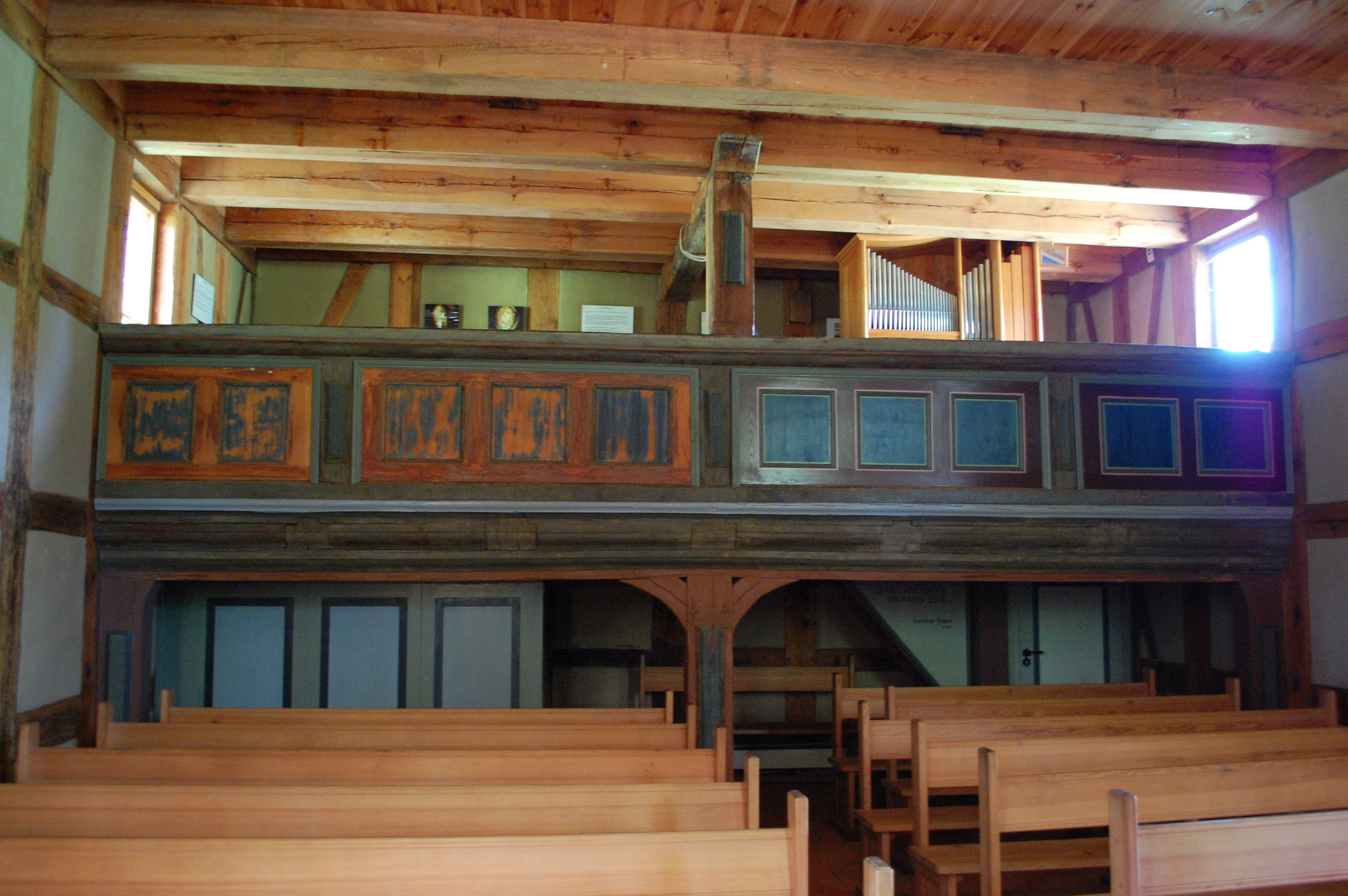 Empore im Kirchlein im Grünen